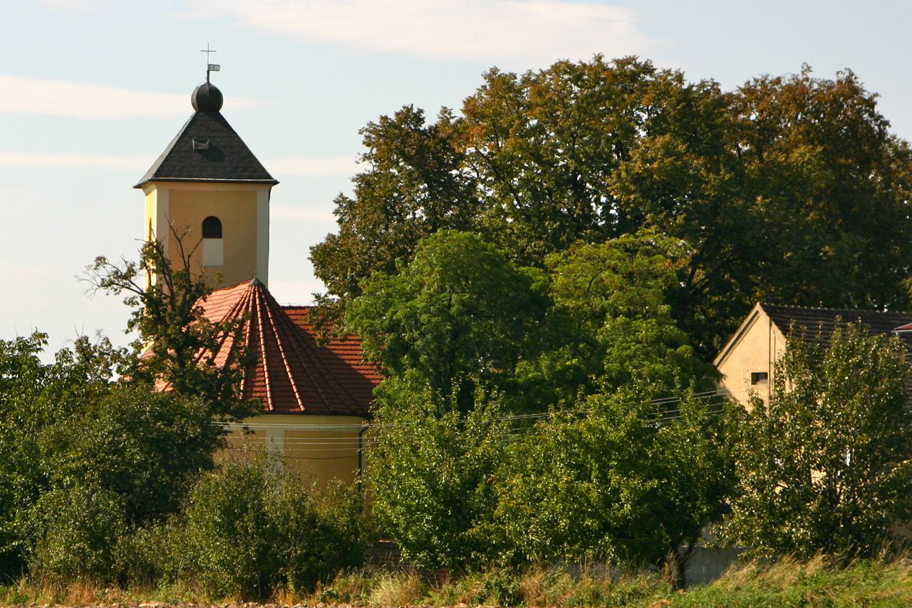 Gostomia (dodatkowa nazwa w j. niem. Simsdorf) – wieś w Polsce położona w województwie opolskim, w powiecie prudnickim, w gminie Biała.